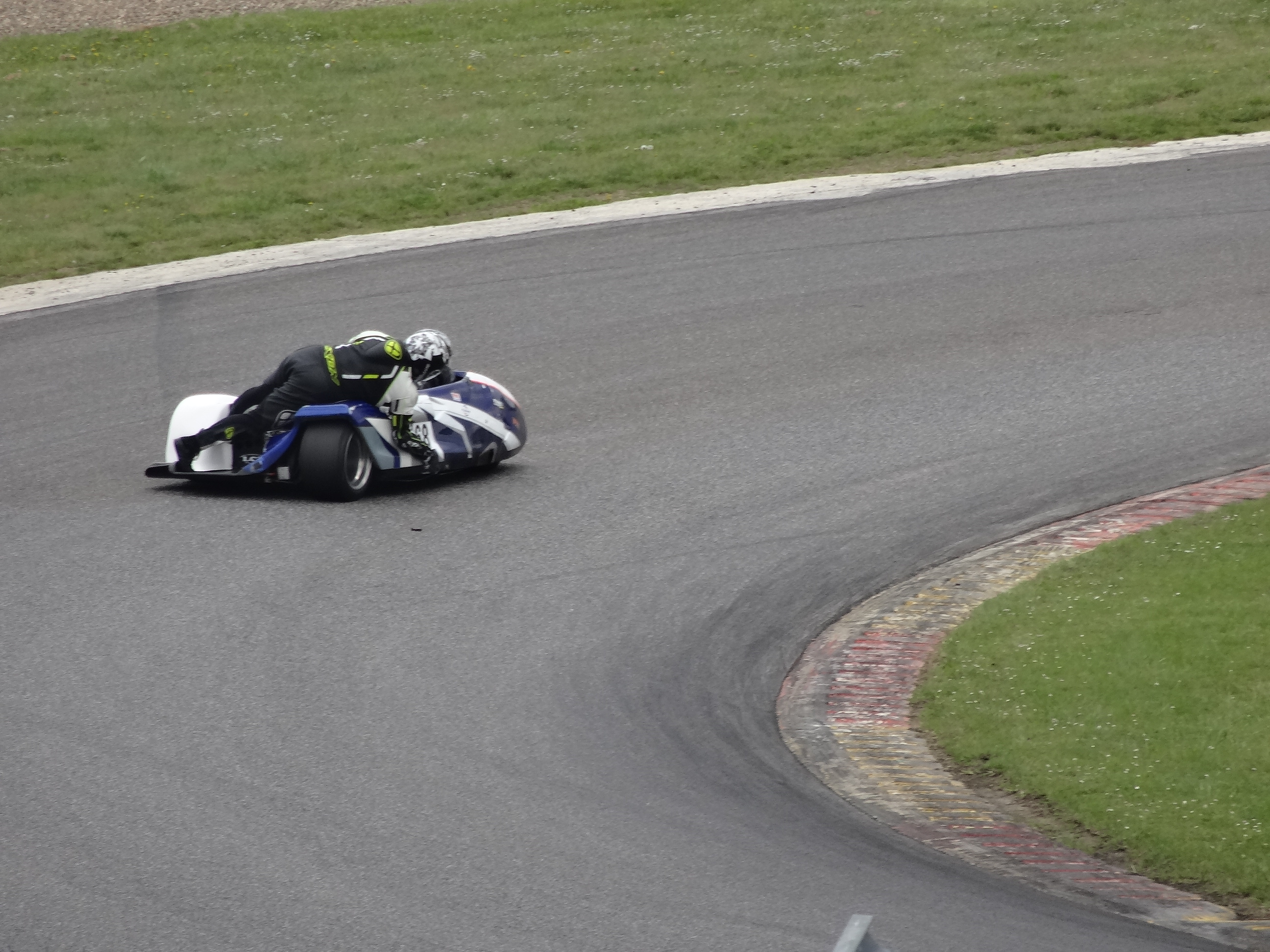 Superbike 2016 Nogaro-38 Circuit Paul Armagnac en avril 2016.